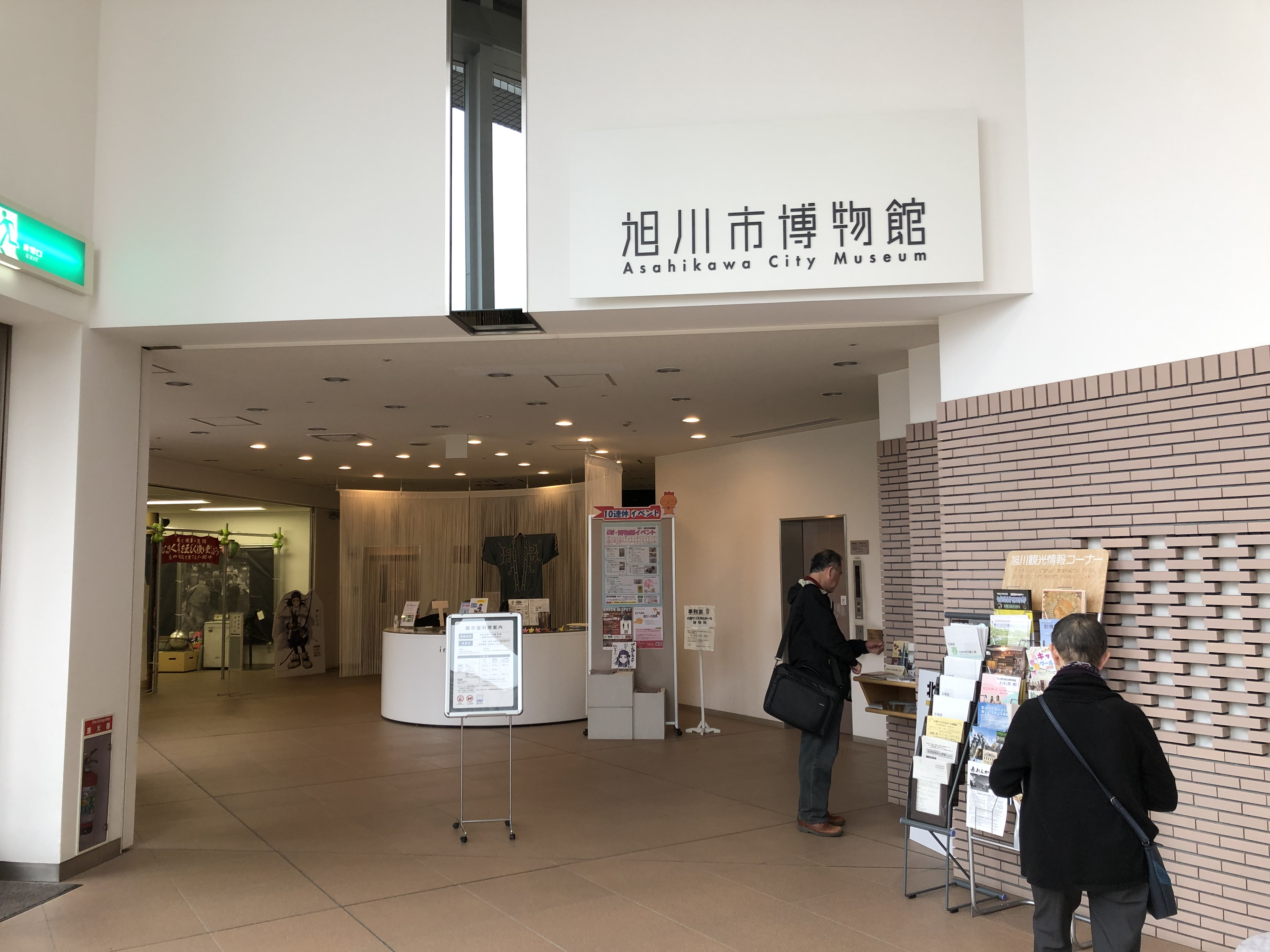 旭川市博物館の出入口付近